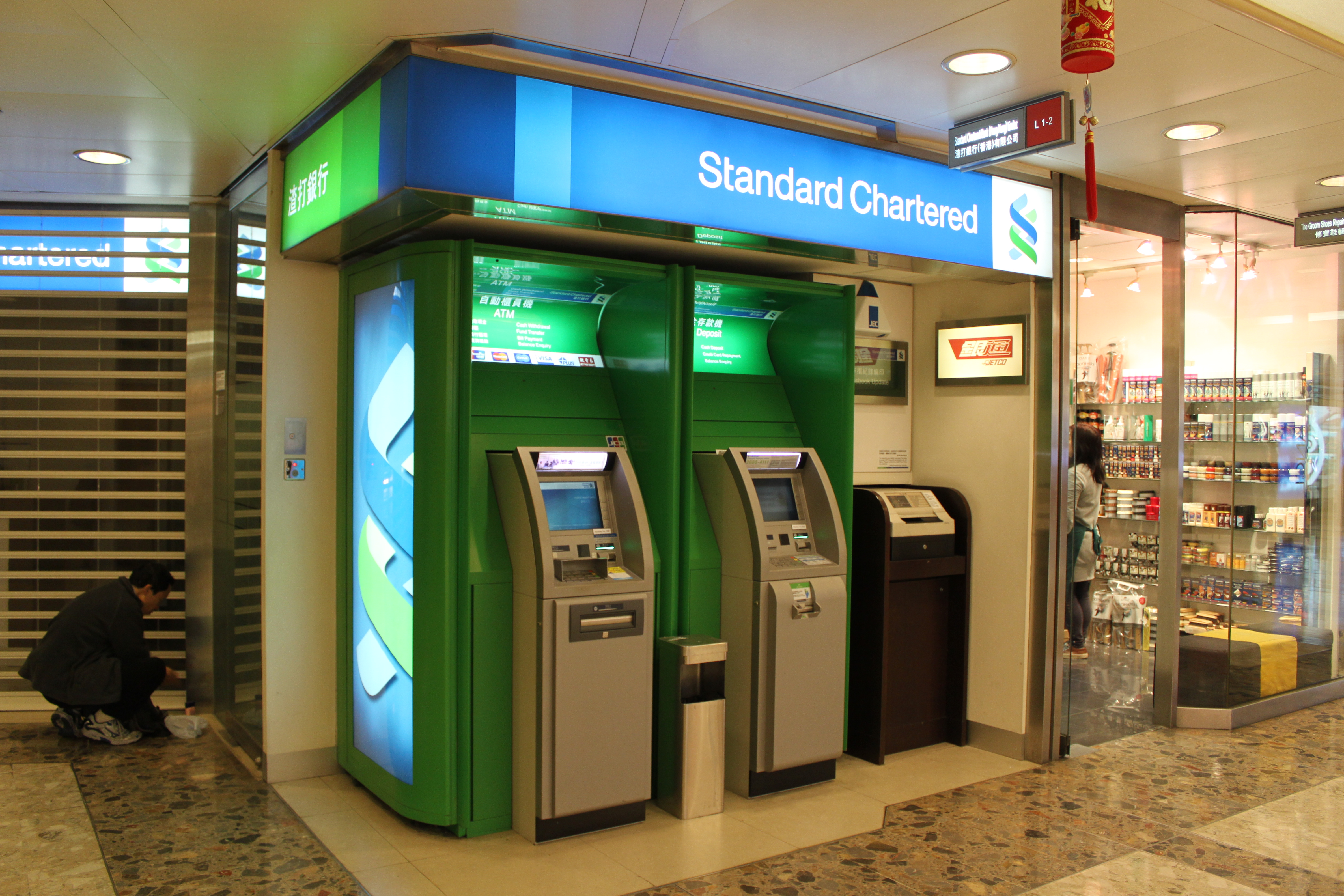 中文（香港）: 香港金鐘廊的渣打銀行(香港)有限公司自動櫃員機。